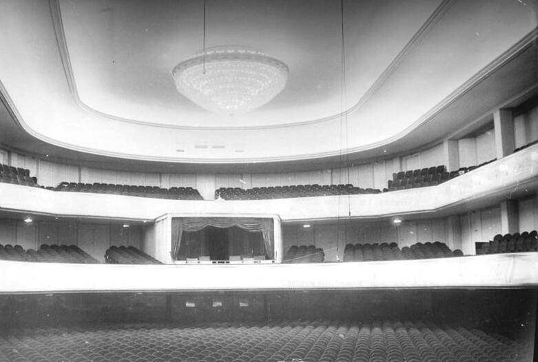 Berlin, Friedrichstraße, Metropol Theater, Zuschauerraum Zentralbild Quasch-. 19.12.1955 Metropoltheater im neuen Haus. Am Dienstag, den 20.12.1955 gibt das Metropoltheater mit der -Fledermaus- die erste Vorstellung in seinem neuen Haus ind der Friedrichstrasse, dem ehemalicgen Admiralpalast, in dem bis vor kurzem noch die Staatsoper gastierte. UBz: Blick in den Zuschauerraum.